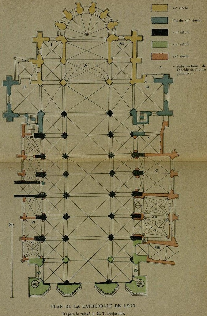 Illustration tirée de 'La cathédrale de Lyon', monographie de la primatiale Saint-Jean par Lucien Bégule (1913)